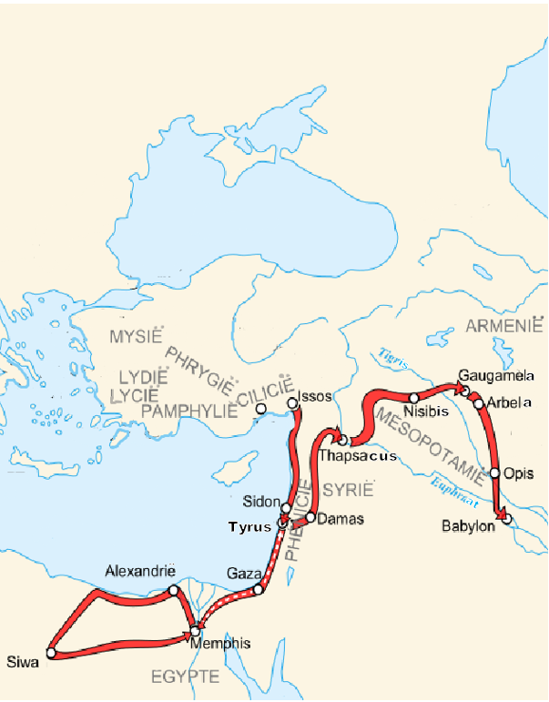 De tocht van Alexander de Grote van Issos tot Babylon